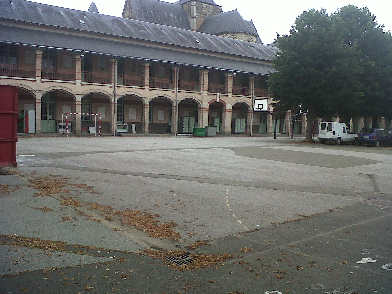 Travaux en 2012 au Collège Berthelot.